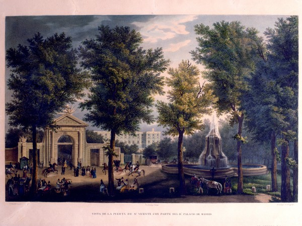 Vista de la Puerta de San Vicente, de Fernando Brambila (1763 - 1834); 39,8 x 45,7 cm ; mancha: 34 x 46,5 cm. Colección del Ministerio de Hacienda de España. Litografía de Andreas PIC DE LEOPOLD en 1833, de un dibujo de Branbilla con una panorámica de la Puerta de San Vicente, que presenta la entrada a Madrid por el nuevo paseo de la Florida, embellecida con el nuevo ingreso trazado por Sabatini en 1775. A su lado, la fuente de los Mascarones, diseñada también por Sabatini y decorada con esculturas de Francisco Gutiérrez, obra desaparecida. Entre puerta y fuente se advierte, al fondo, la fachada occidental del Palacio Real. Colección de estampas del Museo de Historia de Madrid y Ministerio de Hacienda español, a cuya colección pertenece.